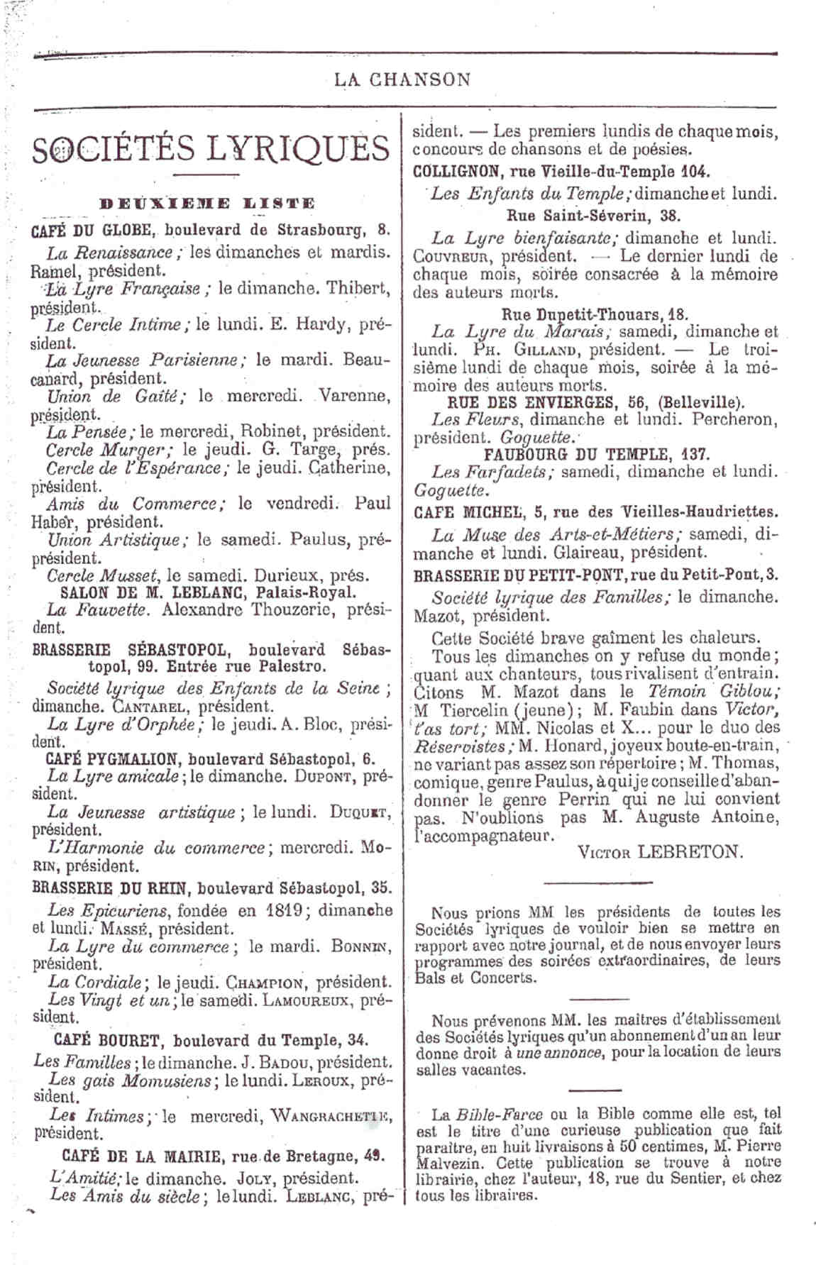 Programme des goguettes parisiennes publié par la revue mensuelle spécialisée "La Chanson", septembre 1878, numéro 5, 1ère année, page 65.